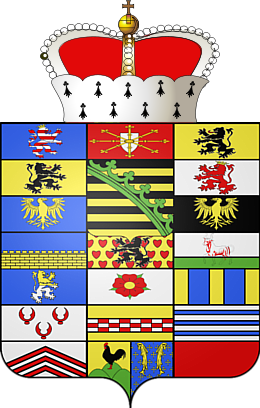 Kleines Wappen des Herzogtums Sachsen-Weißenfels.